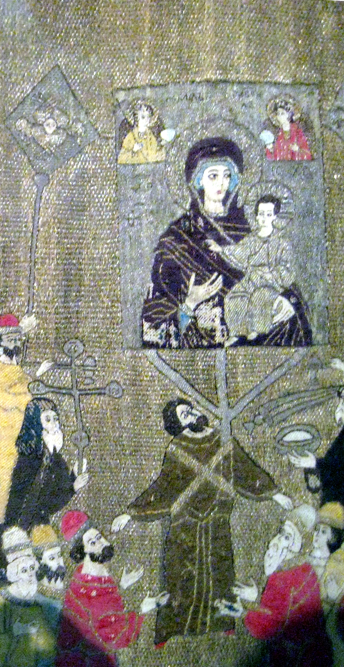 ПЕЛЕНА. ВЫНОС ИКОНЫ «БОГОМАТЕРЬ ОДИГИТРИЯ» Конец XV века Москва Мастерская Елены Стефановны Волошанки (?) Тафта, холст (крашенина), золотосеребряные пряденые нити, цветные шелковые нити; вышивка 95 х 98 (по большим сторонам) Поступила в 1905–1911 годах Находилась в коллекции М.М. Зайцевского, затем П.И. Щукина Реставрирована в 1925 году в ЦГРМ ГИМ инв. 15495щ РБ-5